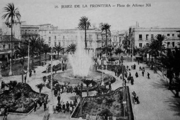 Alt Jerez de la Frontera